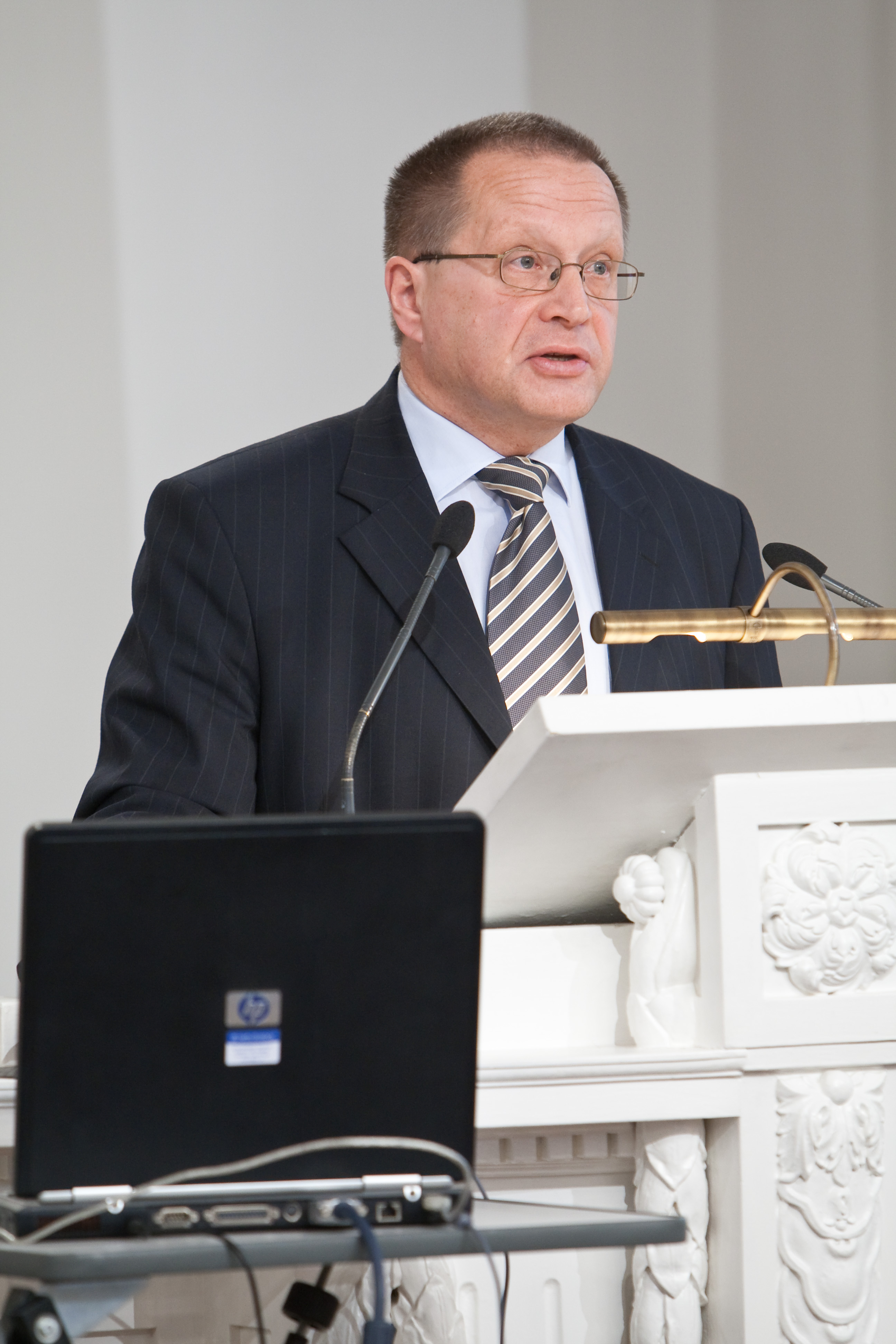 Jüri Allik esinemas L. Puusepa nimelise Neuroloogide ja Neurokirurgide Seltsi talvesseminaril Tartu Ülikooli aulas 5. detsembril 2008.